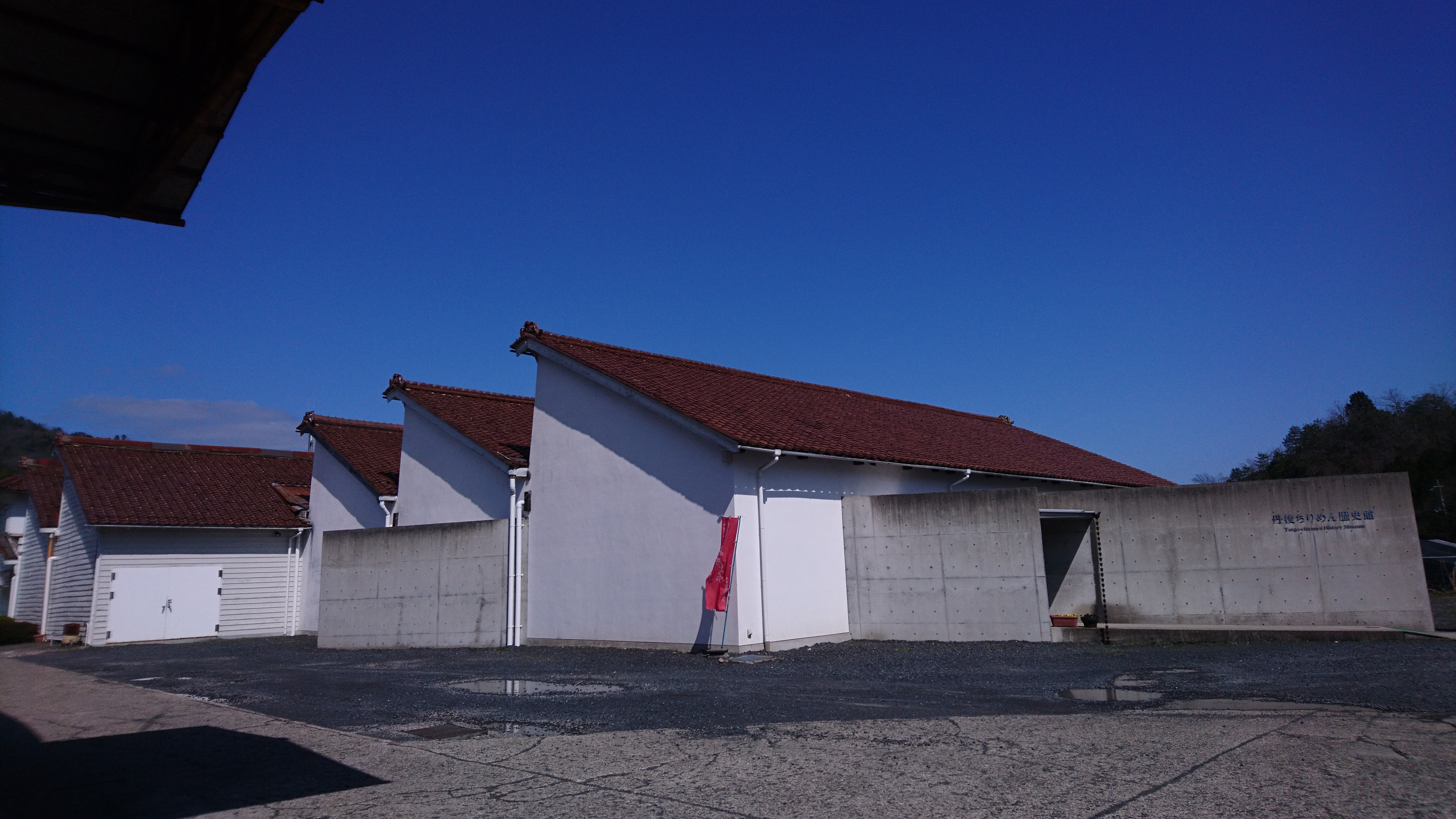 京都府与謝郡与謝野町にある、丹後ちりめんの博物館兼販売所。もともとちりめん工場であった建物を使用しており、ちりめん工場特有のノコギリ屋根を見ることができる。